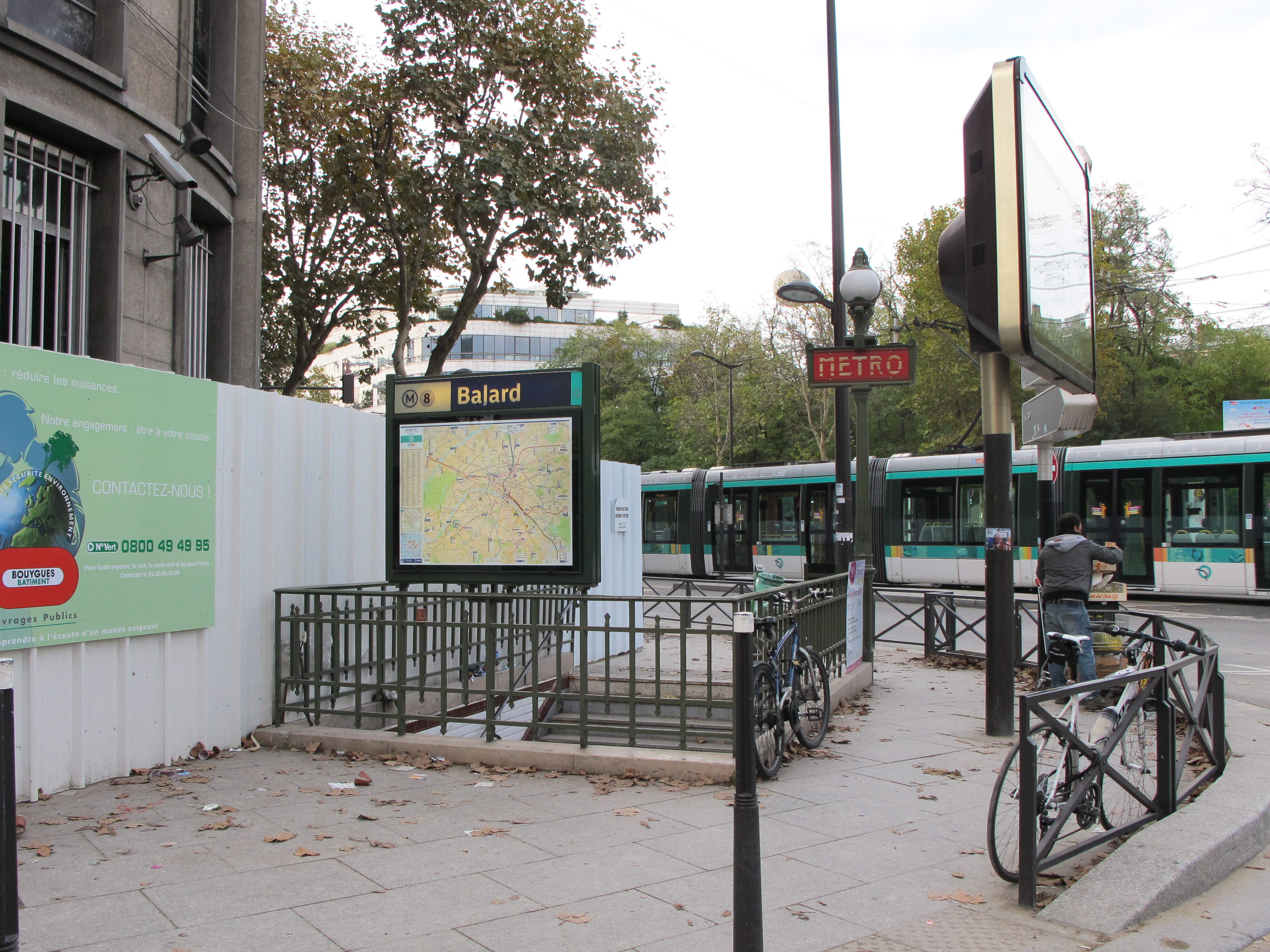 Station de métro Balard, ligne 8 du métro de Paris- Paris, France